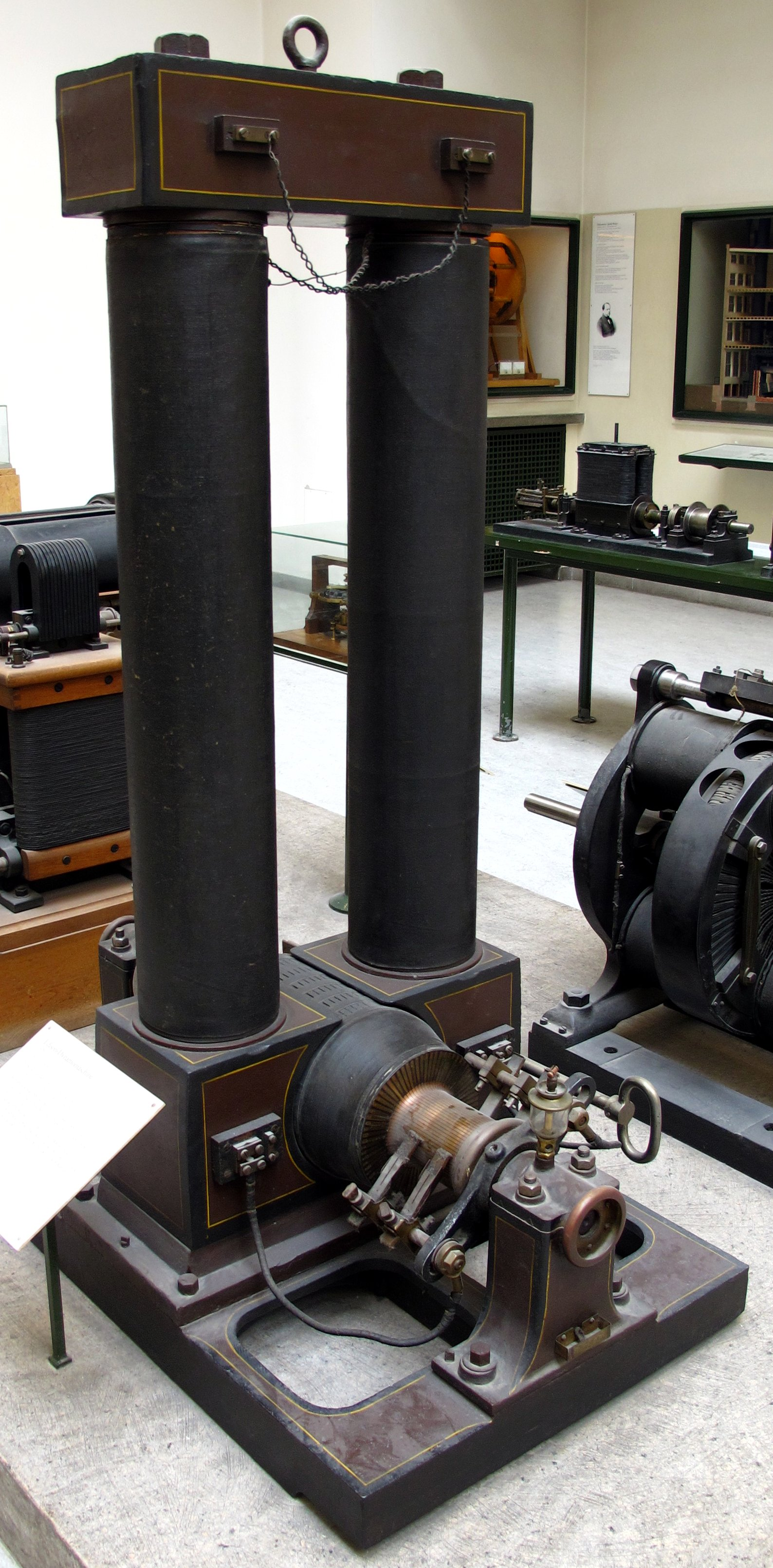 Edison-Dynamomaschine, Nebenschlussmaschine mit Trommelanker. Diese Maschine war 1881 auf der Internationalen Elektrizitätsaustellung in Paris ausgestellt und war eine der ersten Generatoren für Glühlampen. Dieser Generator speiste rund 80 Glühlampen. Hersteller: Edison, 1879 Leistung: 5 kW Gleichspannung: 110 V Maximaler Strom: 45 A Drehzahl: 1100 Umdrehung pro minute